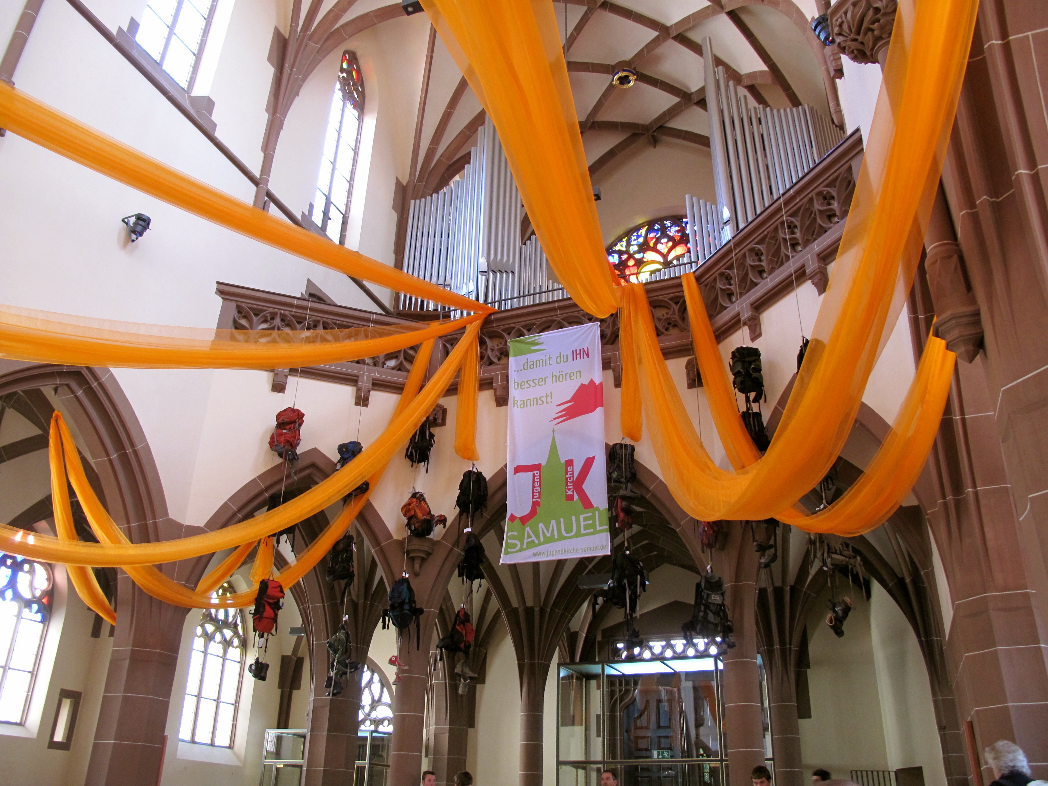 Jugendkirche Samuel von innen, neben der Moschee